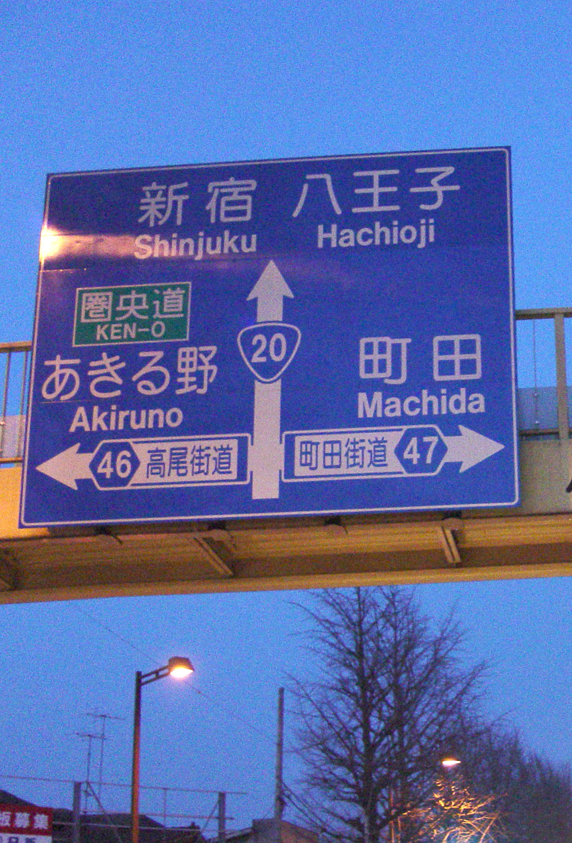 Machida Kaido Entrance Crossing, Signpost ja: 八王子市町田街道入口交差点、国道20号、東京都道46号八王子あきる野線、東京都道47号八王子町田線